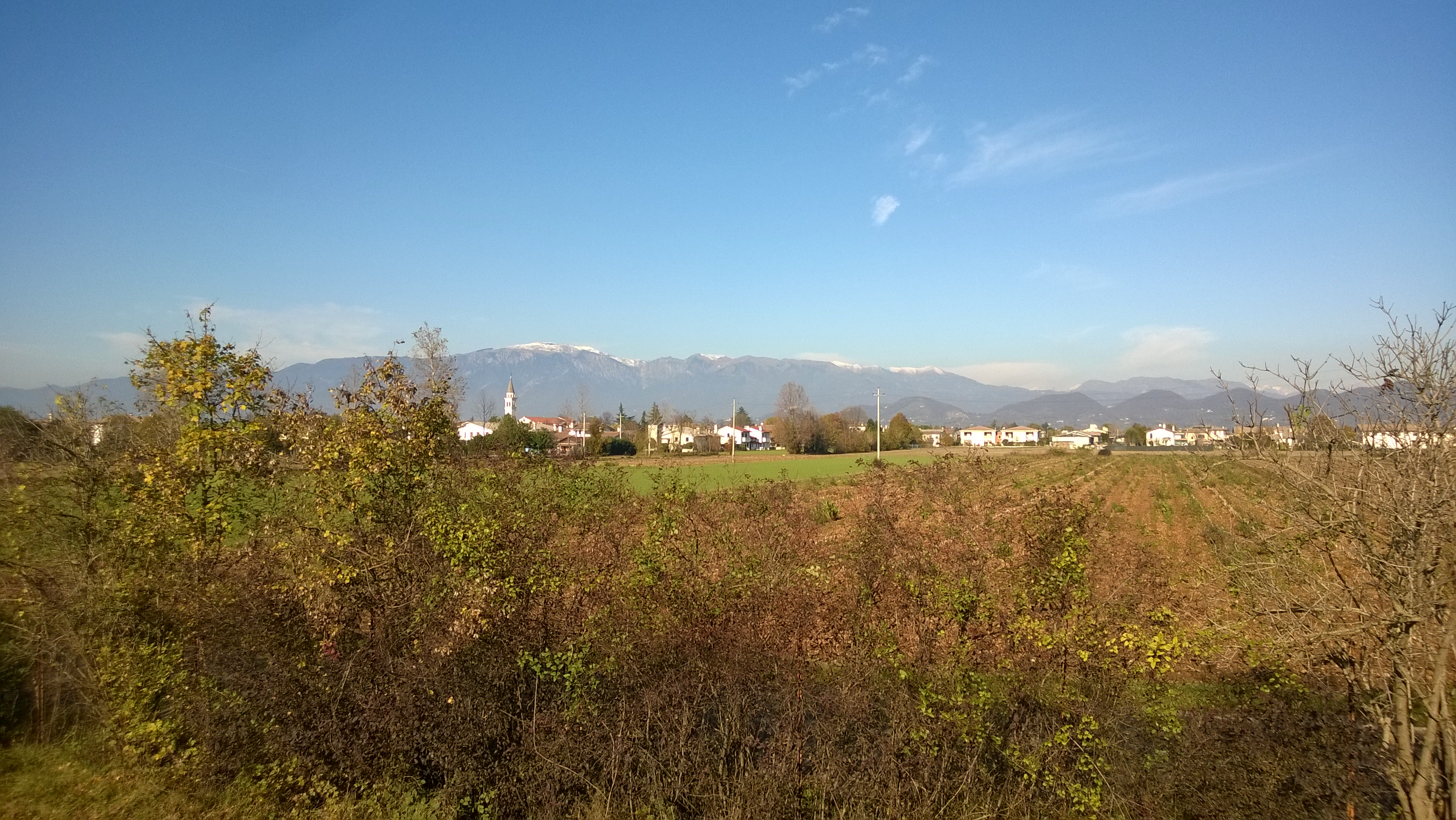 Vista di Altivole e dietro il maestoso Grappa